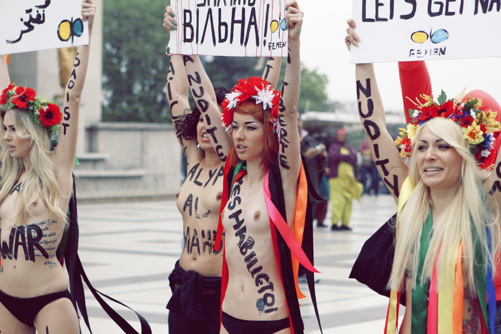 Femen à Paris 31 mars 2012.